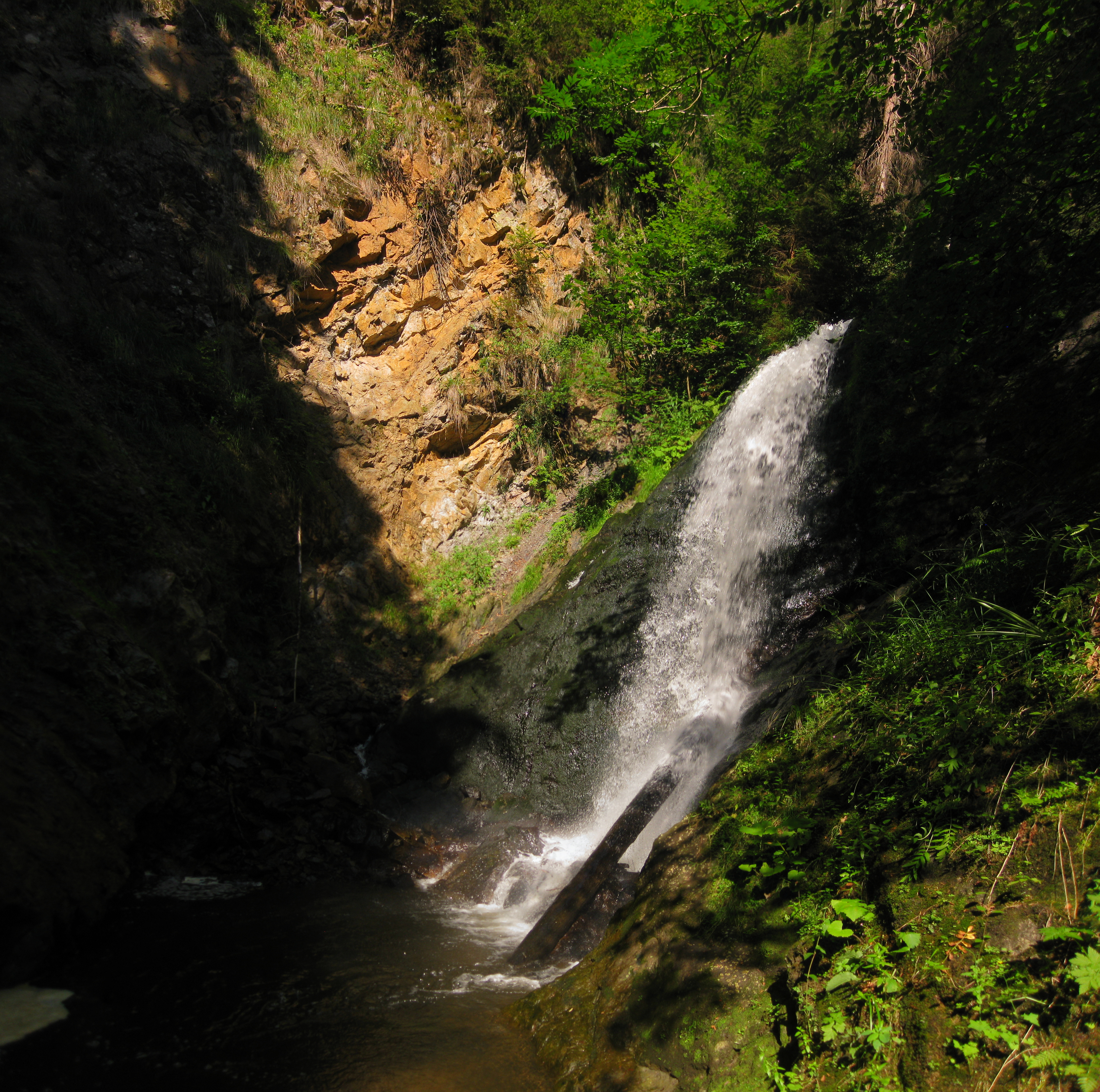 Großer Ravennafall, Ravennaschlucht, Schwarzwald, Deutschland